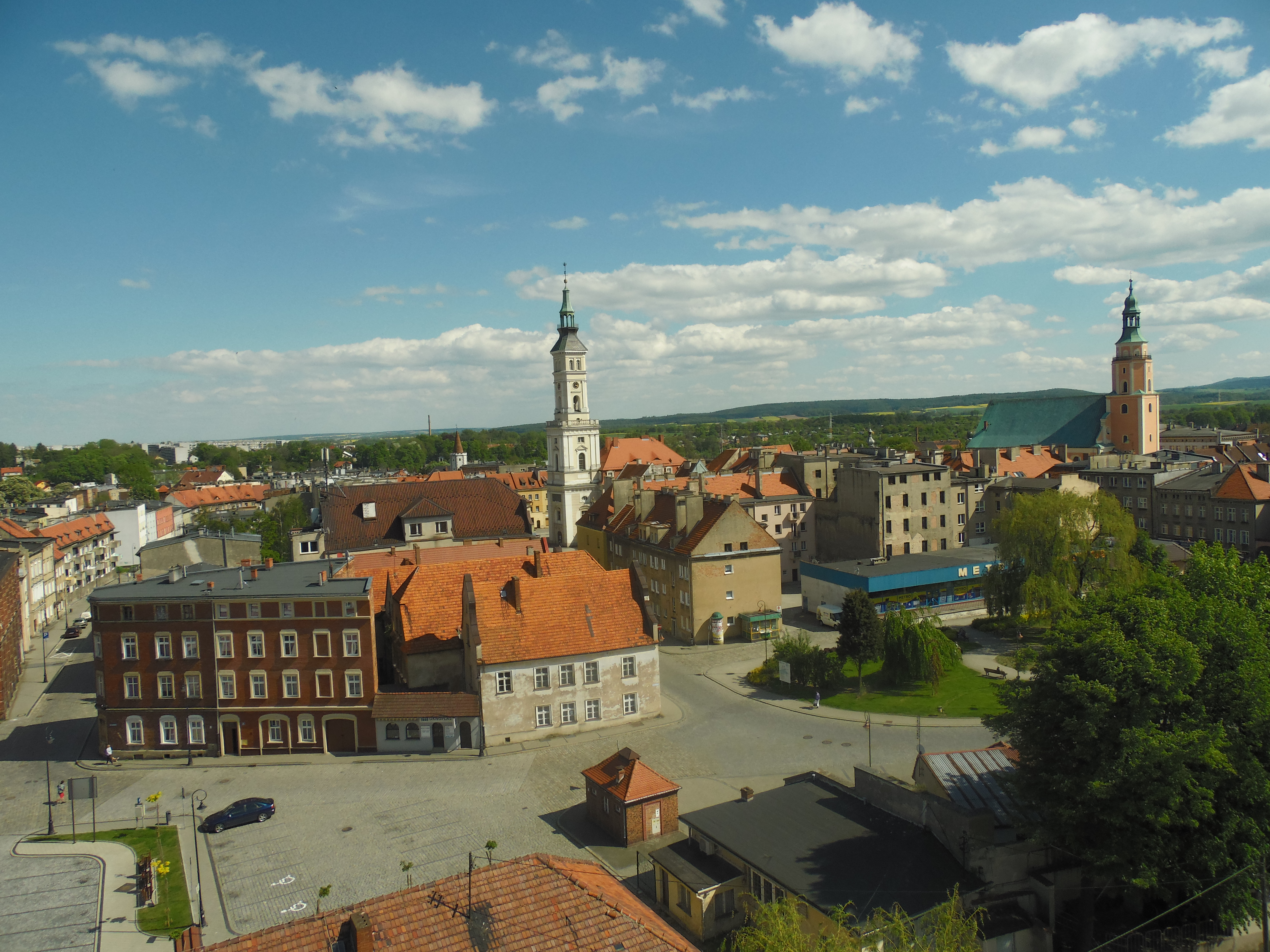 Prudnik, Poland